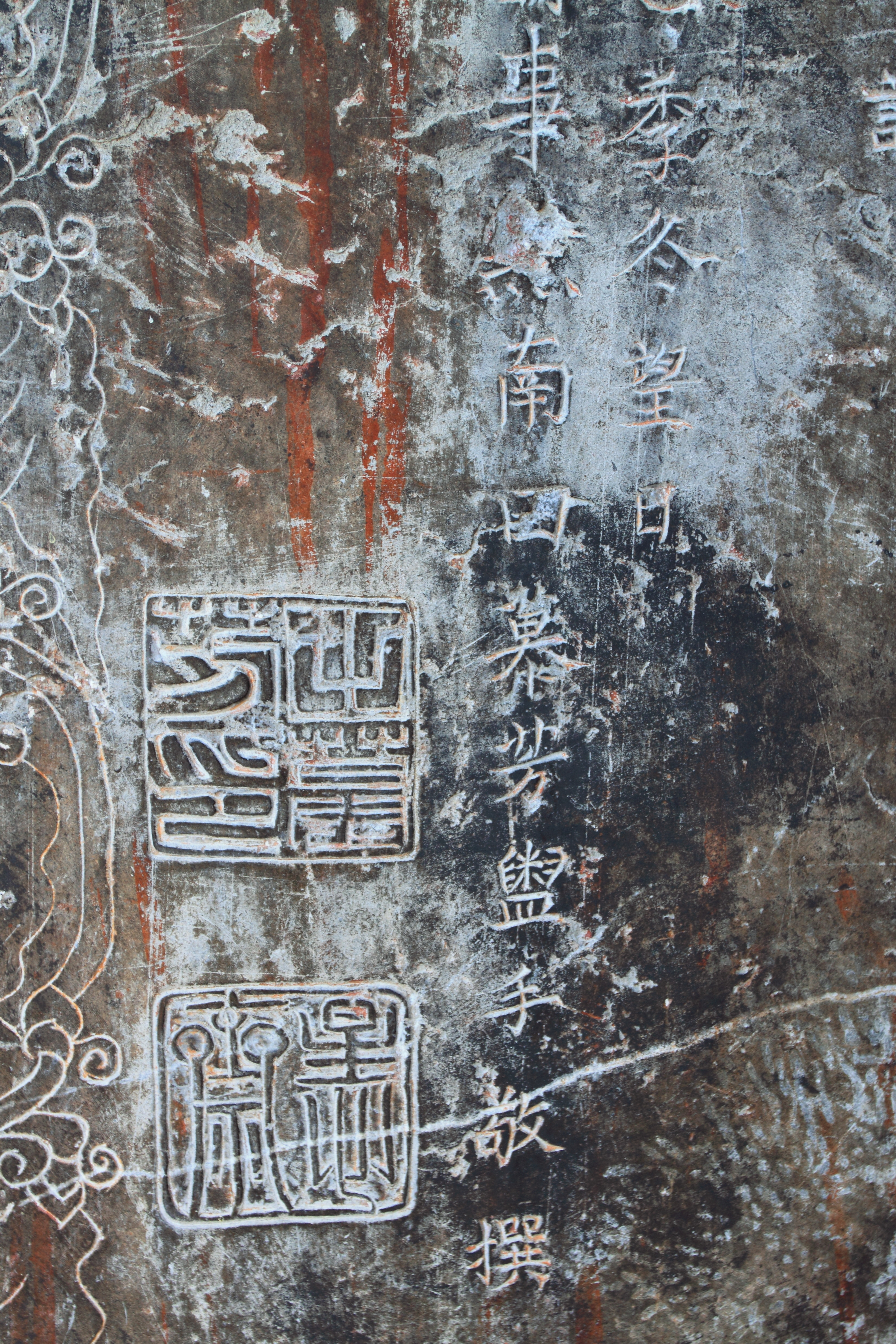 恭城文庙 —— 大成门碑刻《恭城县重建文庙碑记》局部